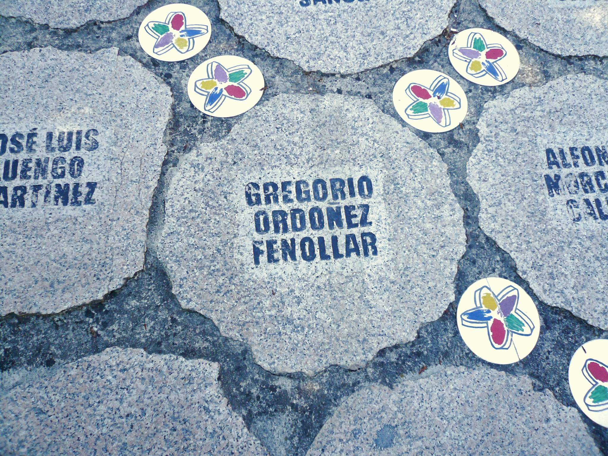 Monumento a las Victimas de ETA (Vitoria)